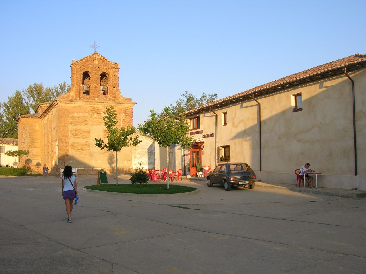 Un bonito nombre para una pequeña y encantadora localidad donde termina el Camino de Santiago a su paso por la provincia de Palencia.